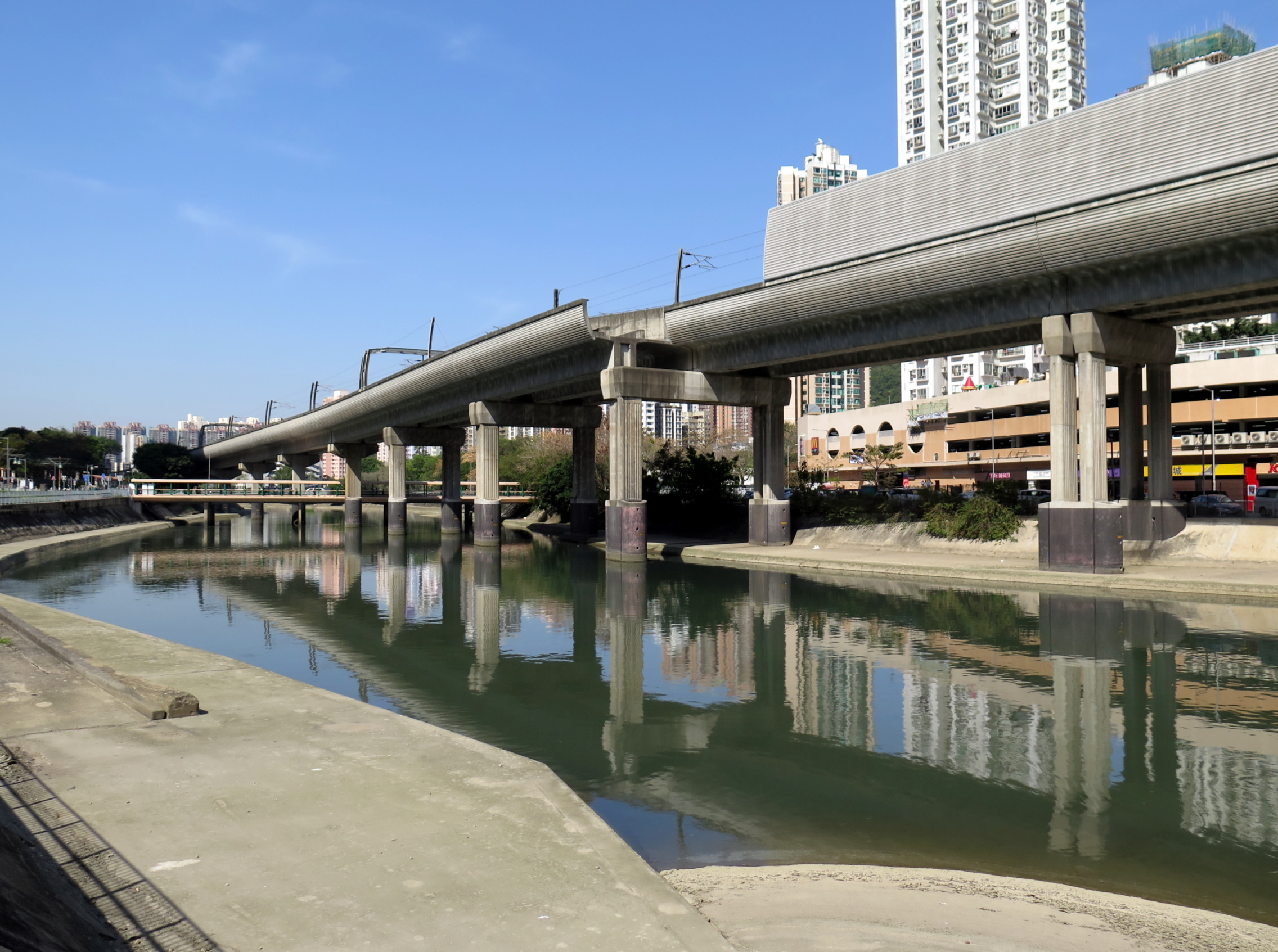 Tuen Mun Viaduct Extension Track